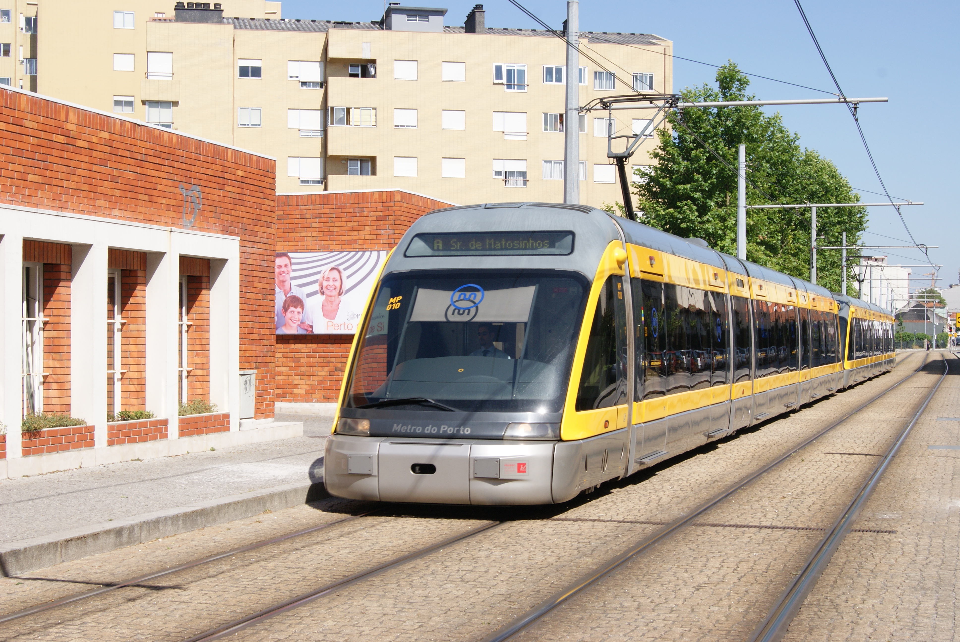 Photo. Trams aux Fils. Pour moi, ce n'est pas un métro, pas un tram et pas un train, mais les trois à la fois.